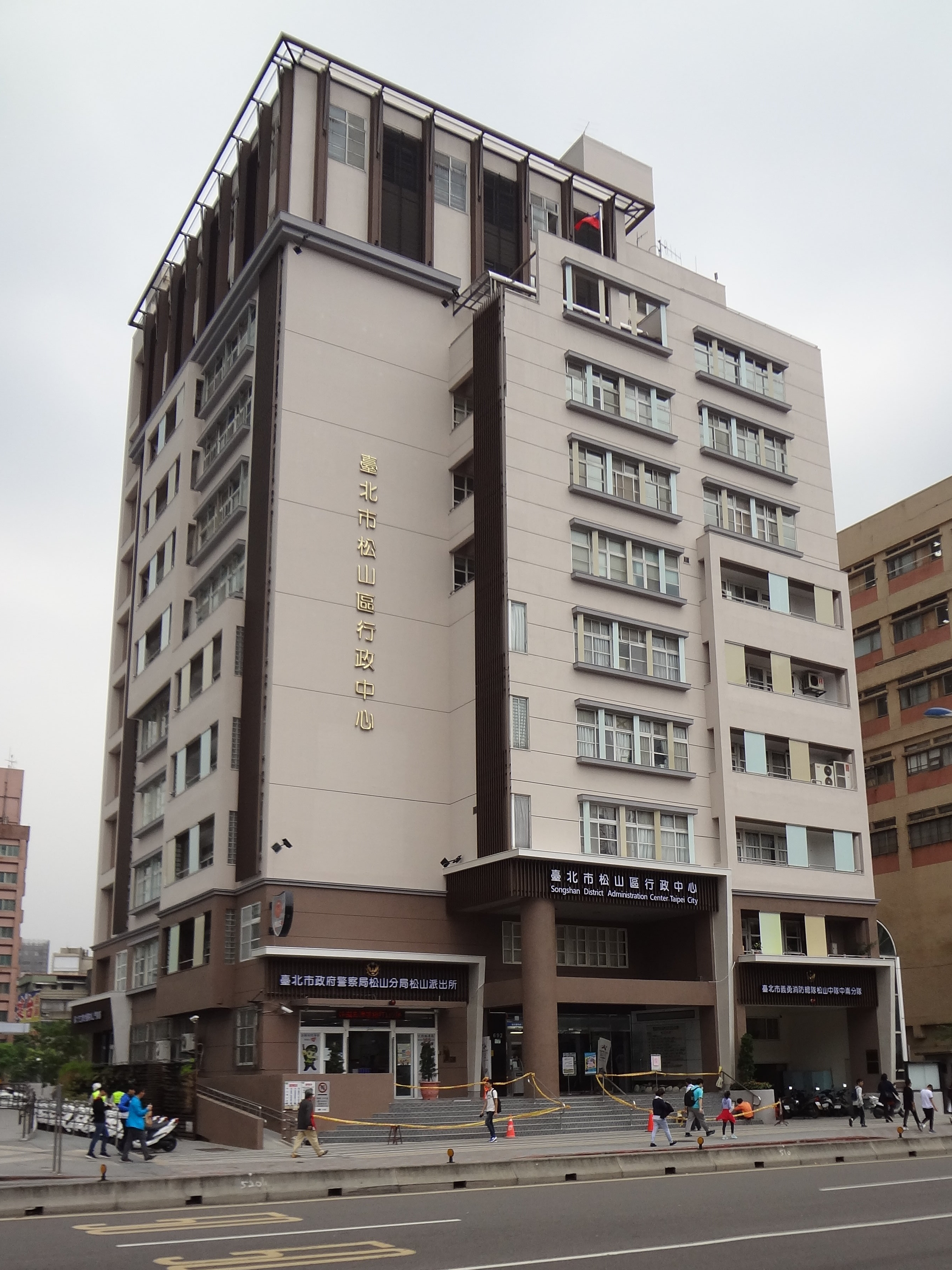 臺北市松山區行政中心大樓，位於臺北市松山區八德路四段692、694號。